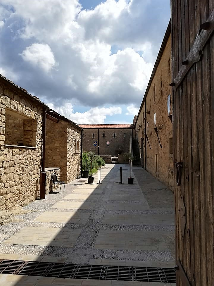 Ambienti ingresso settentrionale.